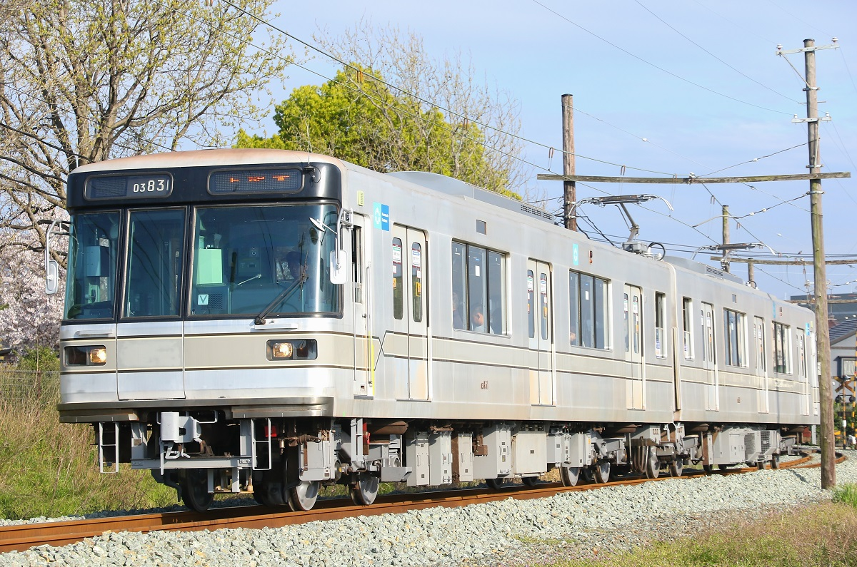 2019年4月5日 打越付近にて。